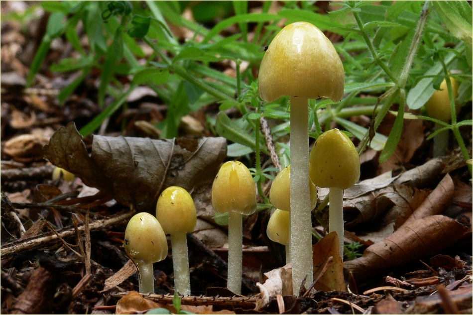 Goldmistpilze (Bolbitius vitellinus)